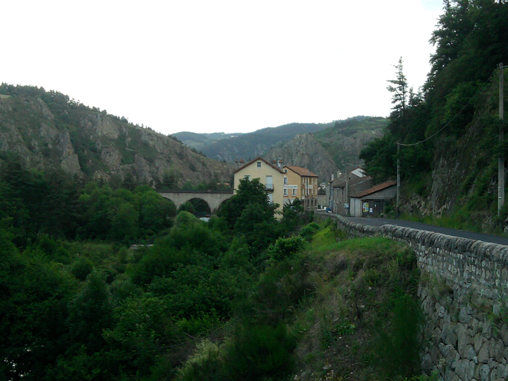 48600 Saint-Bonnet-de-Montauroux, France